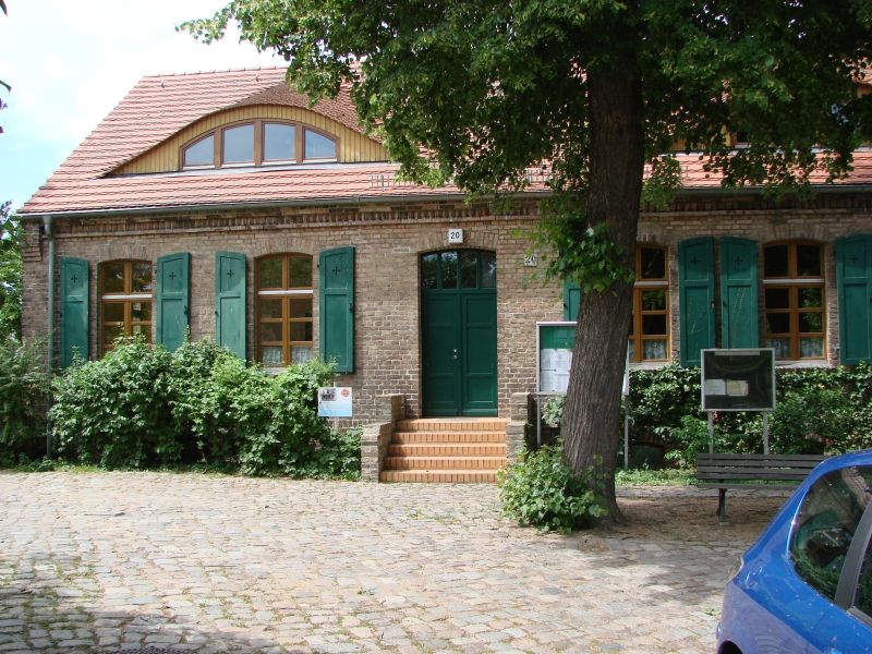 Ehemalige Dorfschule in Nudow. Heute Bürgerhaus und Wohnung. Schule wurde bis 1968 für den Unterricht genutzt.